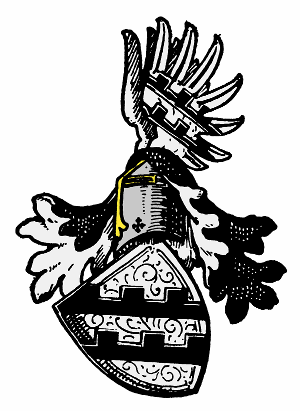 Stammwappen der von Görtz